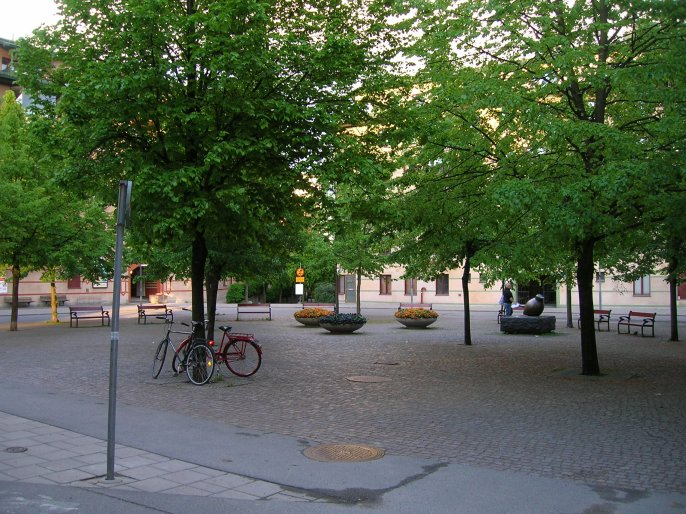 Vintertullstorget, Sodermalm, Stockholm, Sweden